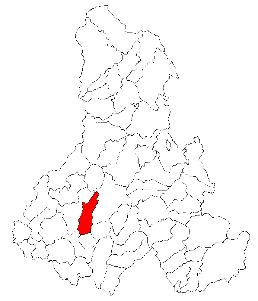 Categorie:Hărţi ale judeţului Harghita Contents 1 Licensing 2 Sursă 3 Licensing 4 Original upload log Licensing Sursă ro::Imagine:Harta_jud_Harghita.png